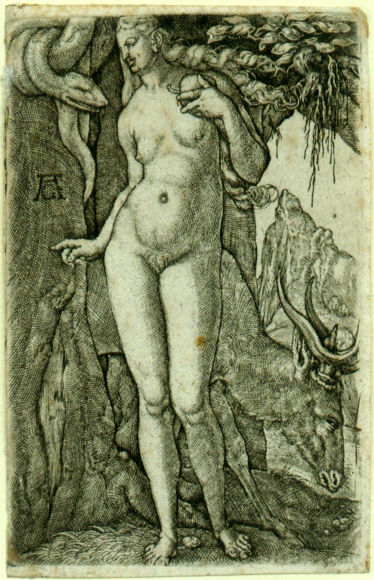 Aldegrever, Heinrich. Eve with a stag. Engraving, 1540. B., Holl. 12. “Der im New Hollstein gennante, aber nicht nachgewiesene, sehr seltene zweite Zustand mit der niedrigeren Stirn und dem gescheitelten Haar. Ausgezeichneter Druck mit winzigem Rändchen bzw. links mit der Plattenkante. Alt aufgezogen, etwas flekkigund mit Kleberesten verso, sonst sehr gut erhalten.